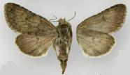 Lasionycta promulsa female